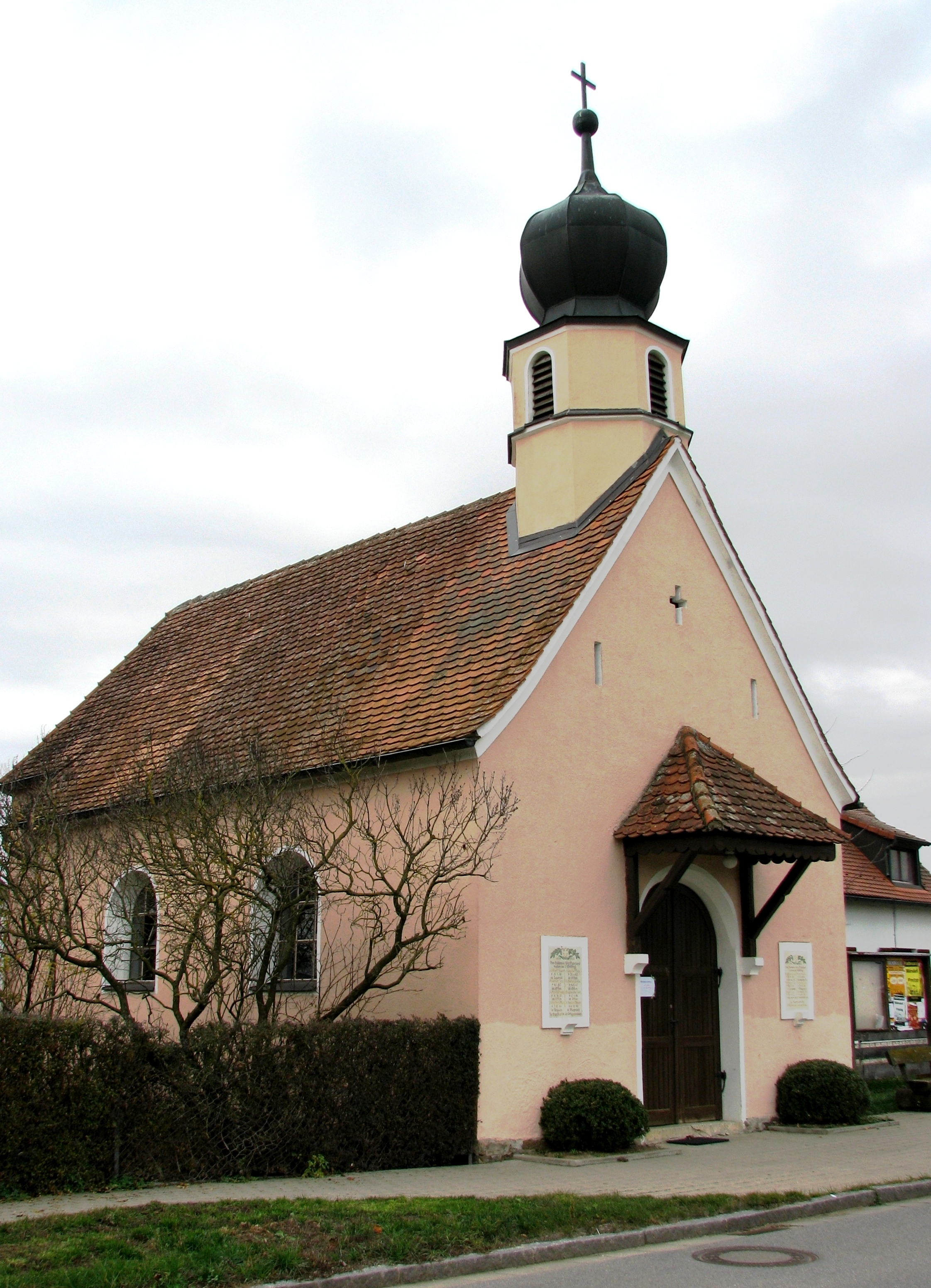 Frettenshofen, Ortsteil von Freystadt im Landkreis Beumarkt in der Oberpfalz (Bayern), Ortskapelle St. Joseph